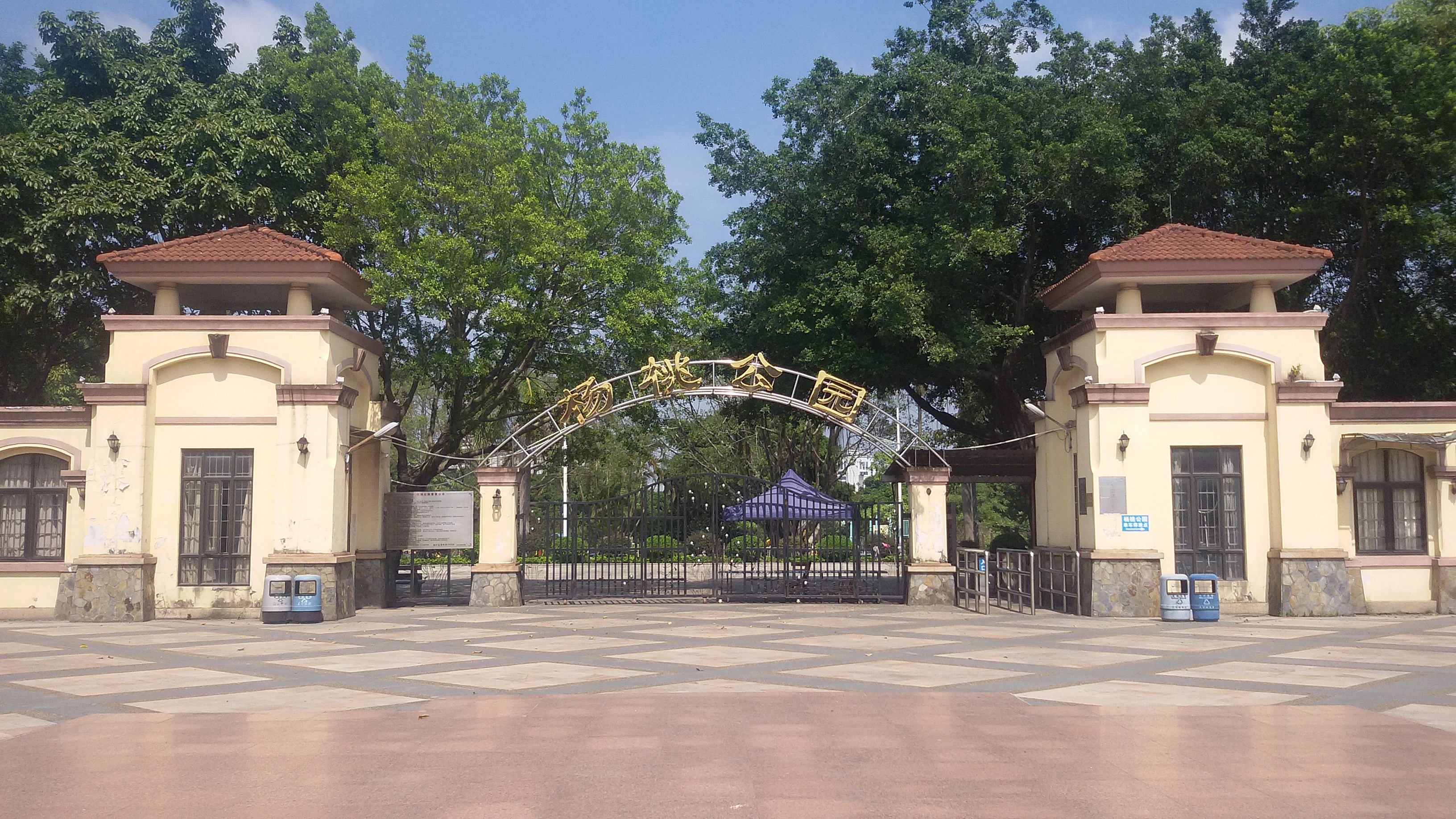 粵語: 天河區楊桃公園